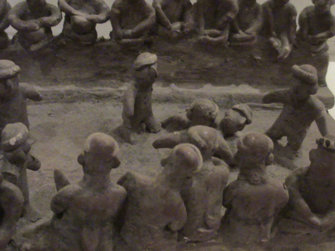 Impresionante detalle del realismo de la escultura en barro de Teuchitlán, Jalisco, México, de un juego de pelota. Note la dinámica de los jugadores de pelota y los asistentes.